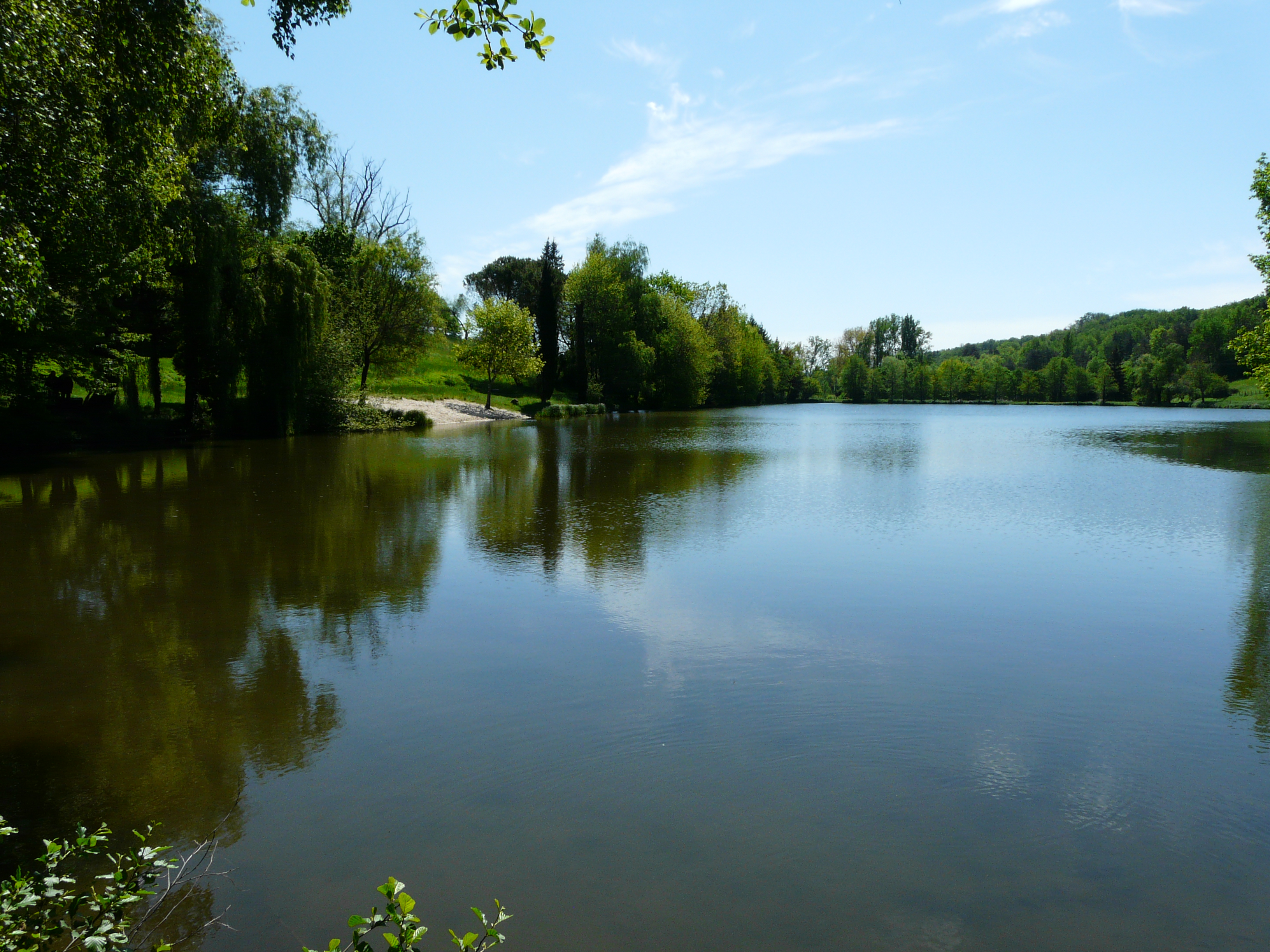 L'étang du Maine sur la Laurence, Thenon, Dordogne, France.